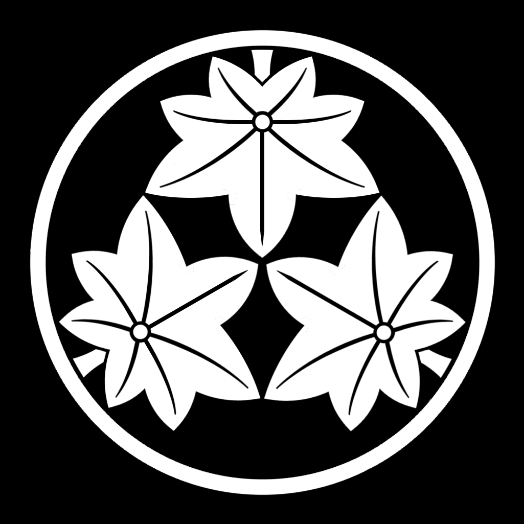 「三つ楓」紋（染抜）